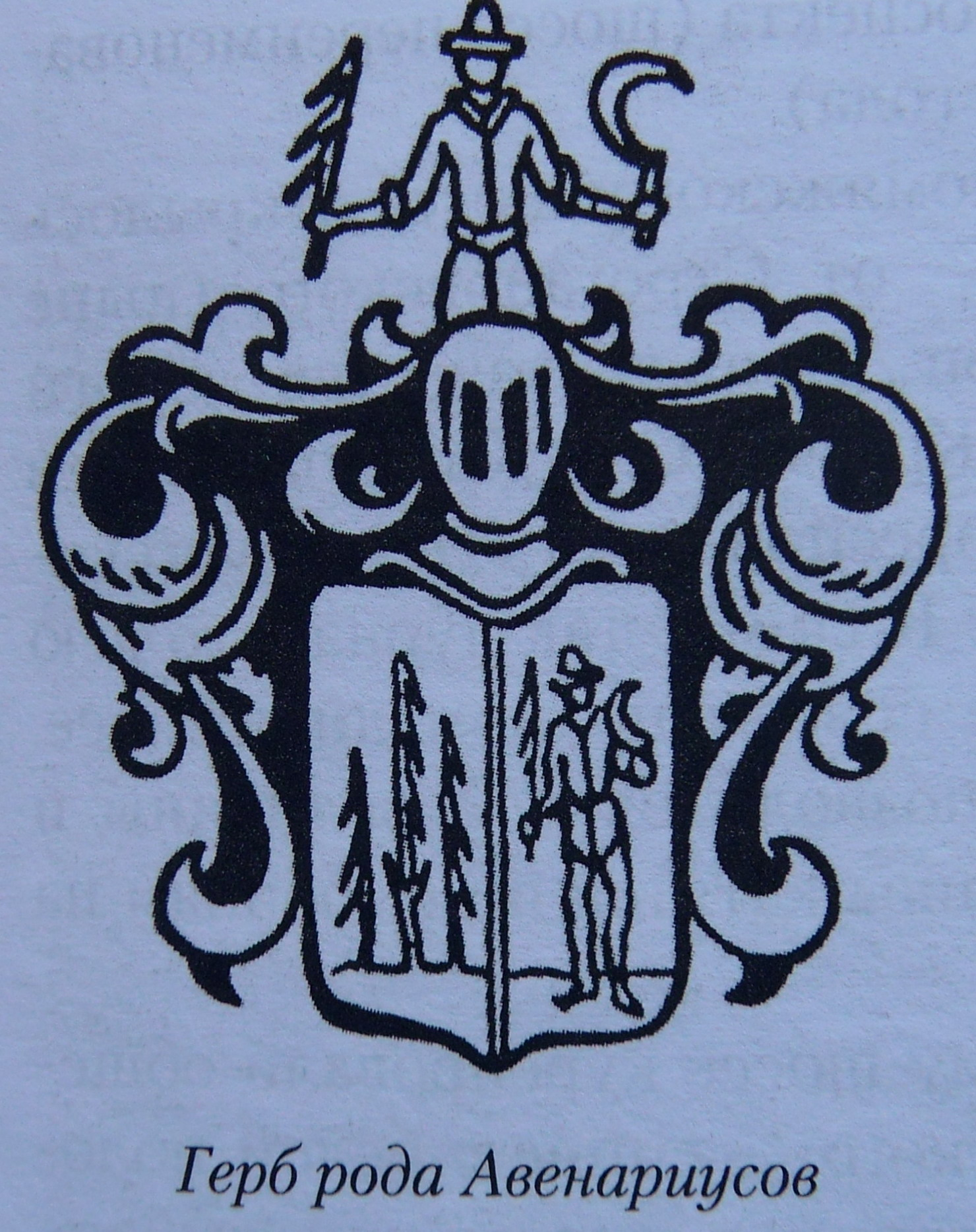 герб рода Авенариусов